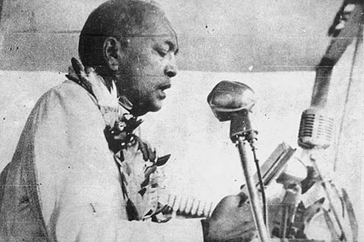 दीक्षाभूमी येथे हिंदू धर्म त्यागापूर्वी आपल्या अनुयायांना स्वतःच्या २२ प्रतिज्ञा देतांना बौद्धधर्म प्रवर्तक डॉ. बाबासाहेब आंबेडकर